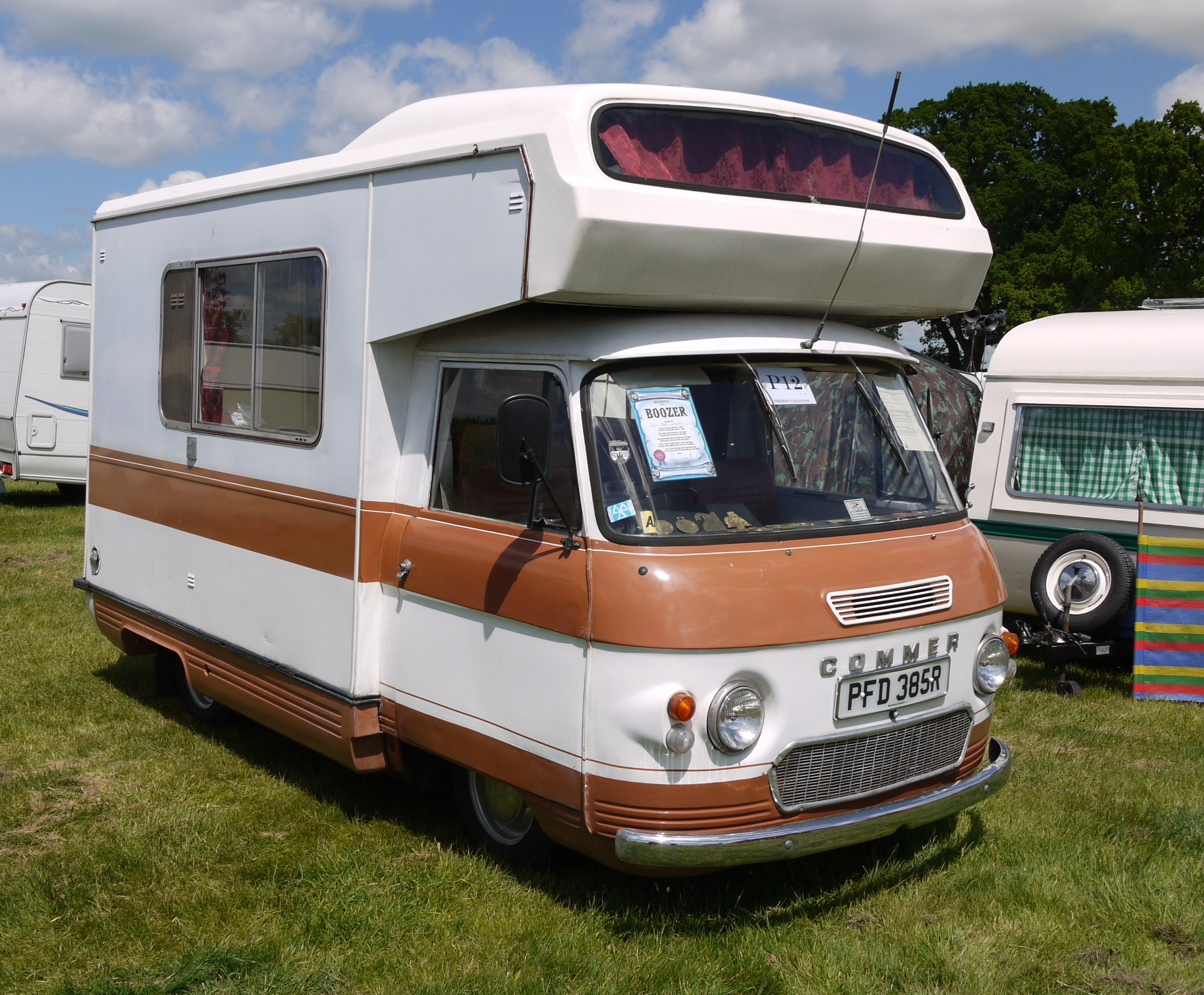 Panasonic G1 14-45 Lens